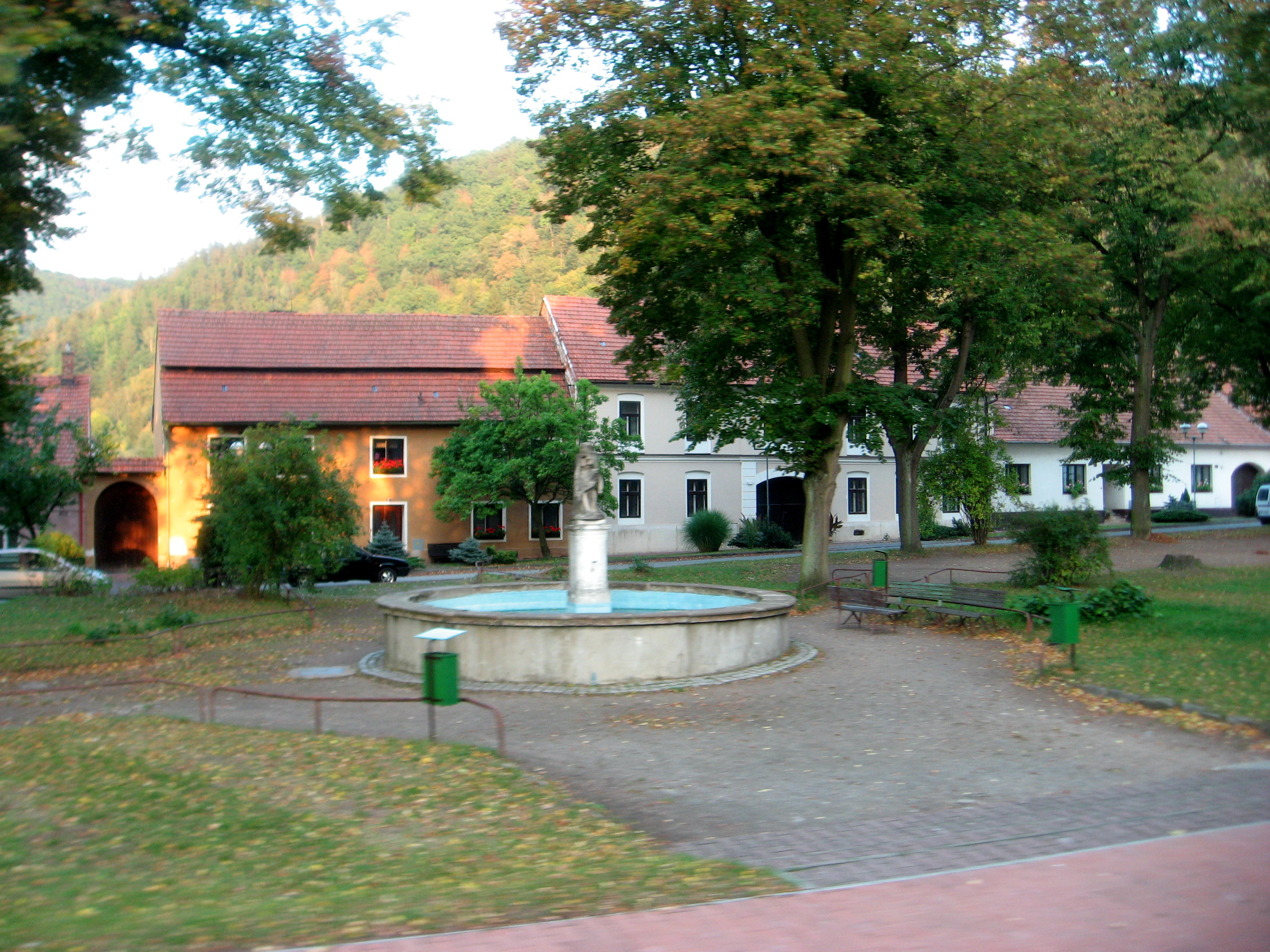 Doubravník, kašna na náměstí